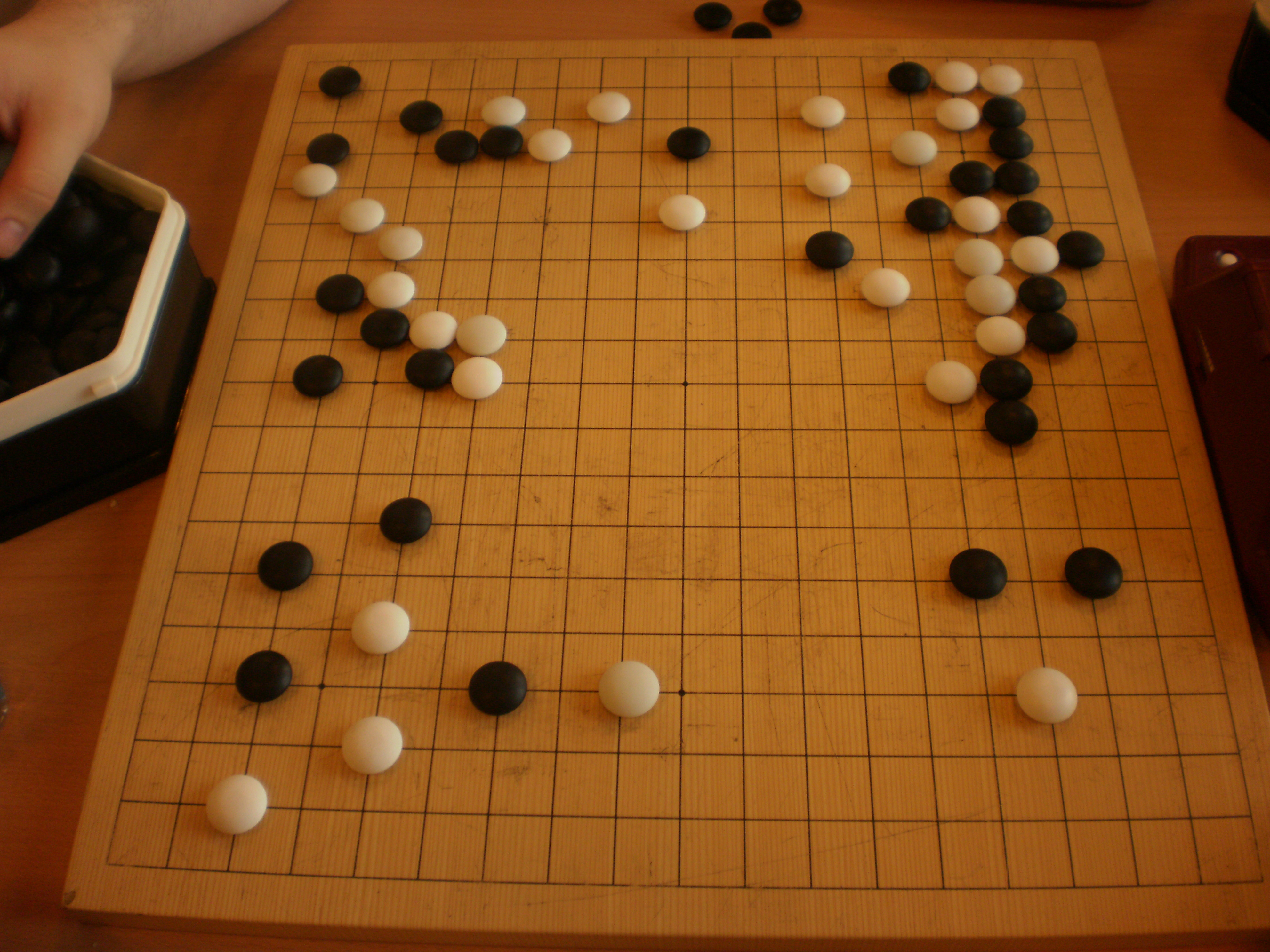 Партия с кубка России (2011, Санкт-Петербург)